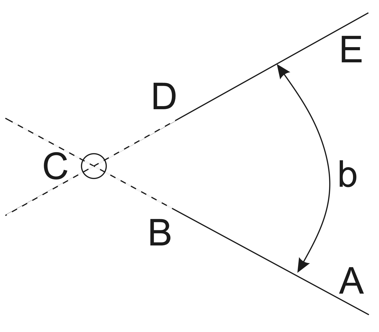 Goniometra mērījumu shēma